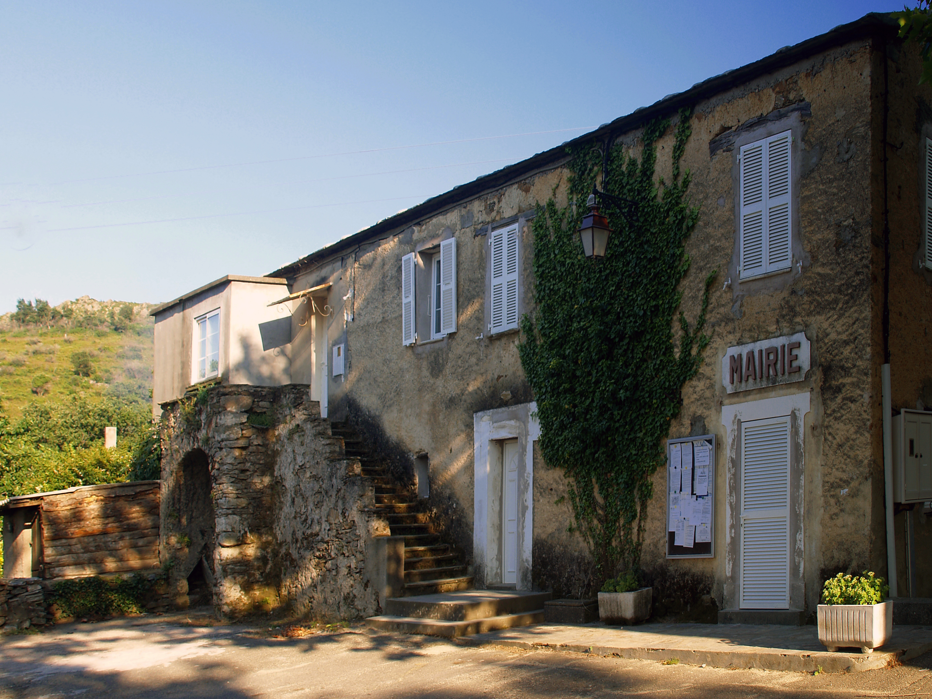 Rapale - Place du village